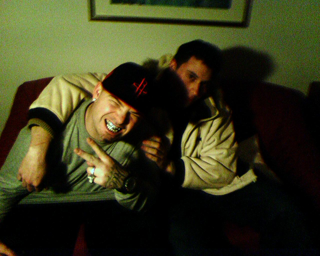 Paul Wall Interview Bild beim Besuch der Diskothek Catwalk in Darmstadt